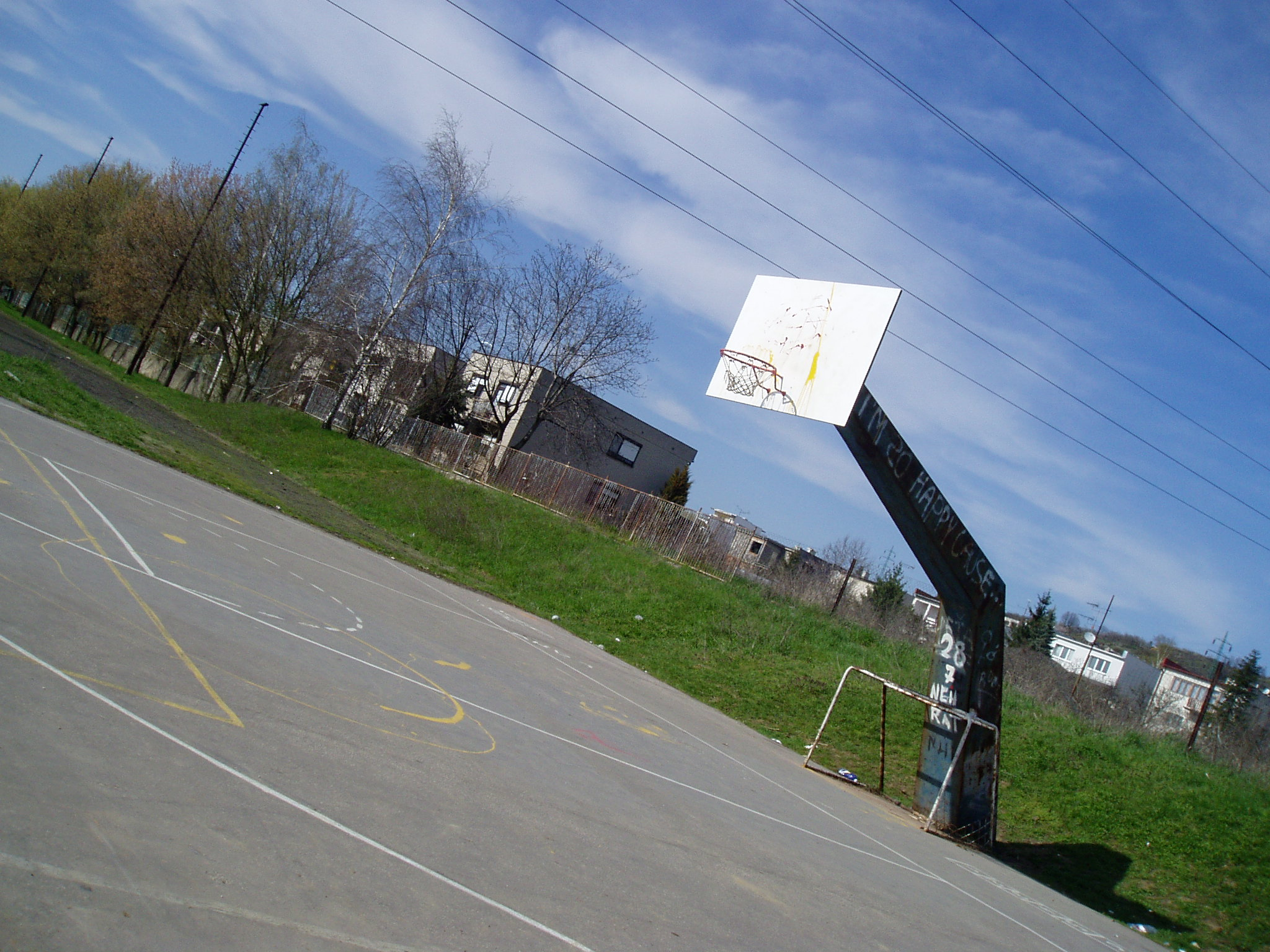 Hlohovec_bball